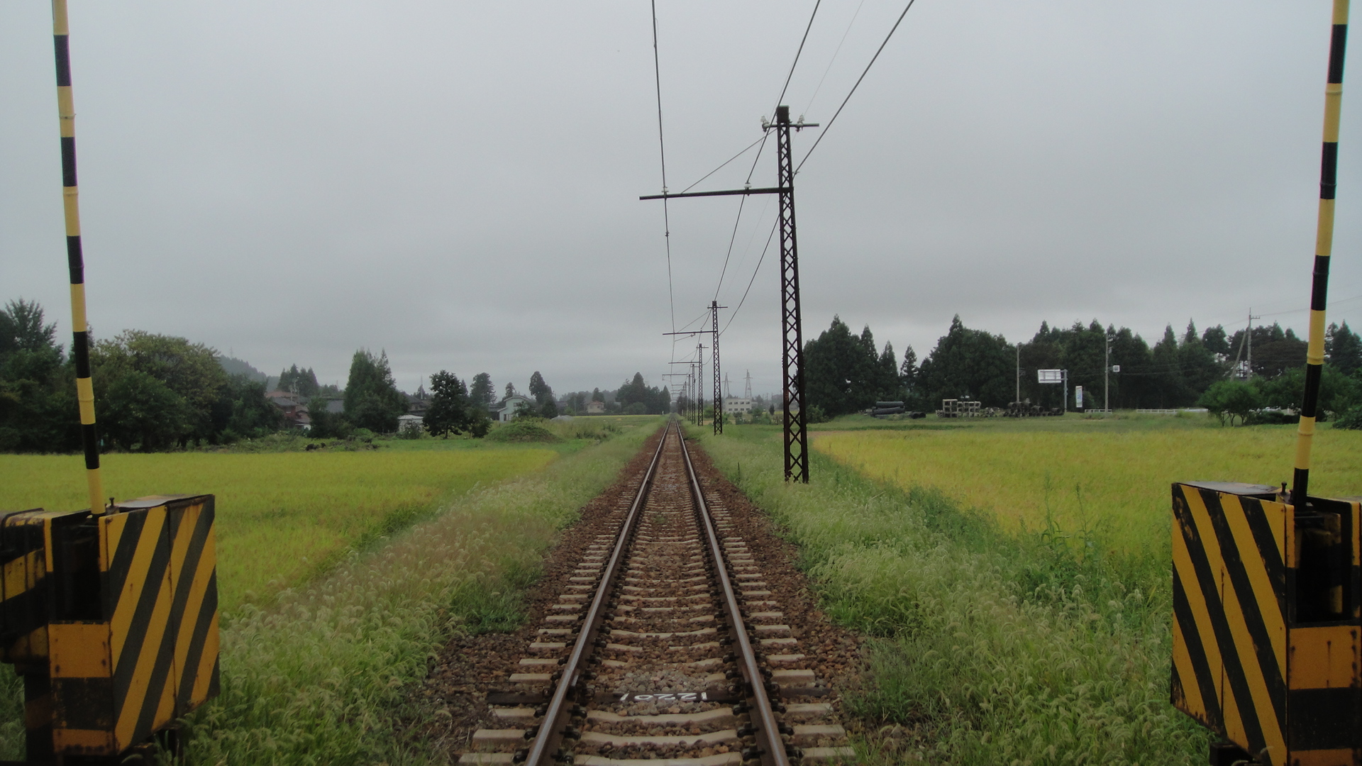 富山地方鉄道立山線 岩峅寺駅-横江駅間の踏切より岩峅寺駅方向を撮影